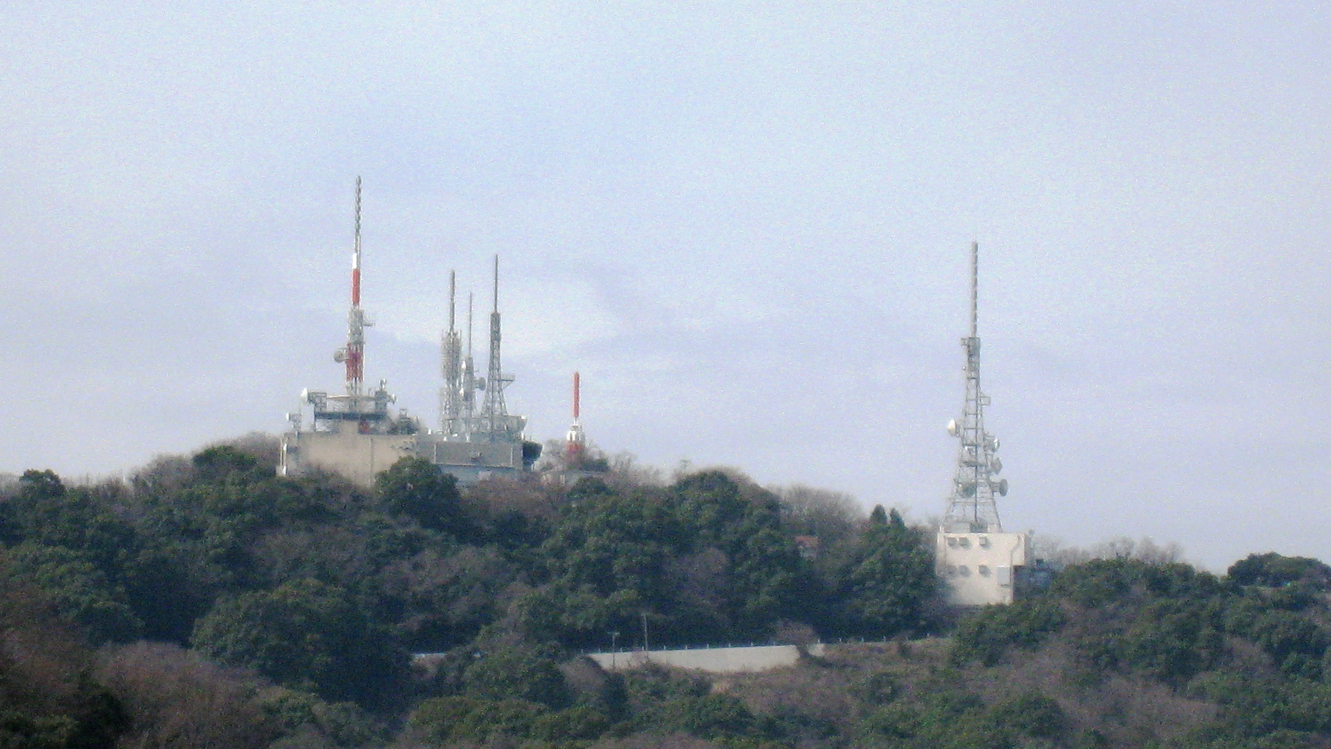 岡山県玉野市から撮影した金甲山送信所